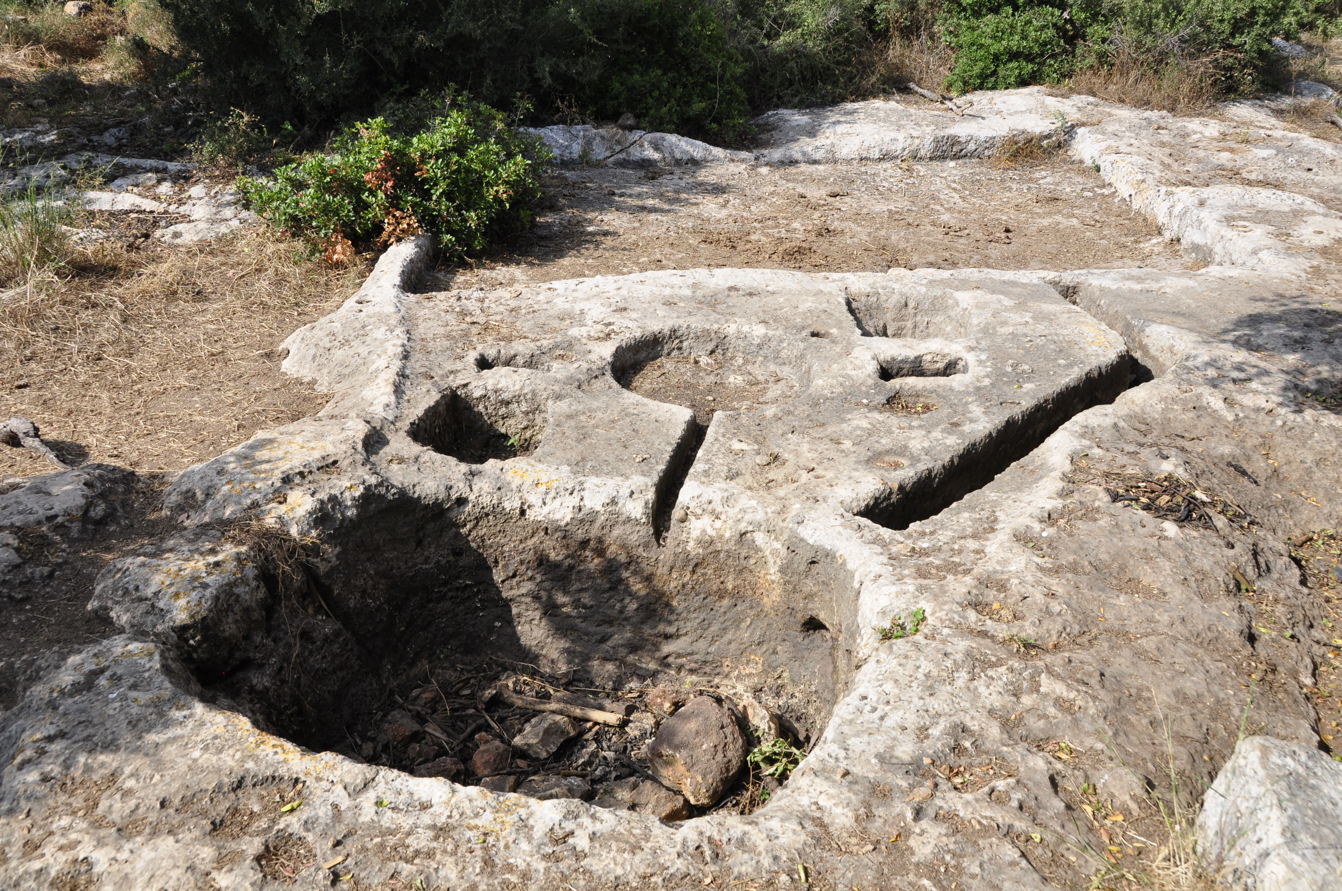 מפעל הסוכר הצלבני בחורבת מנות